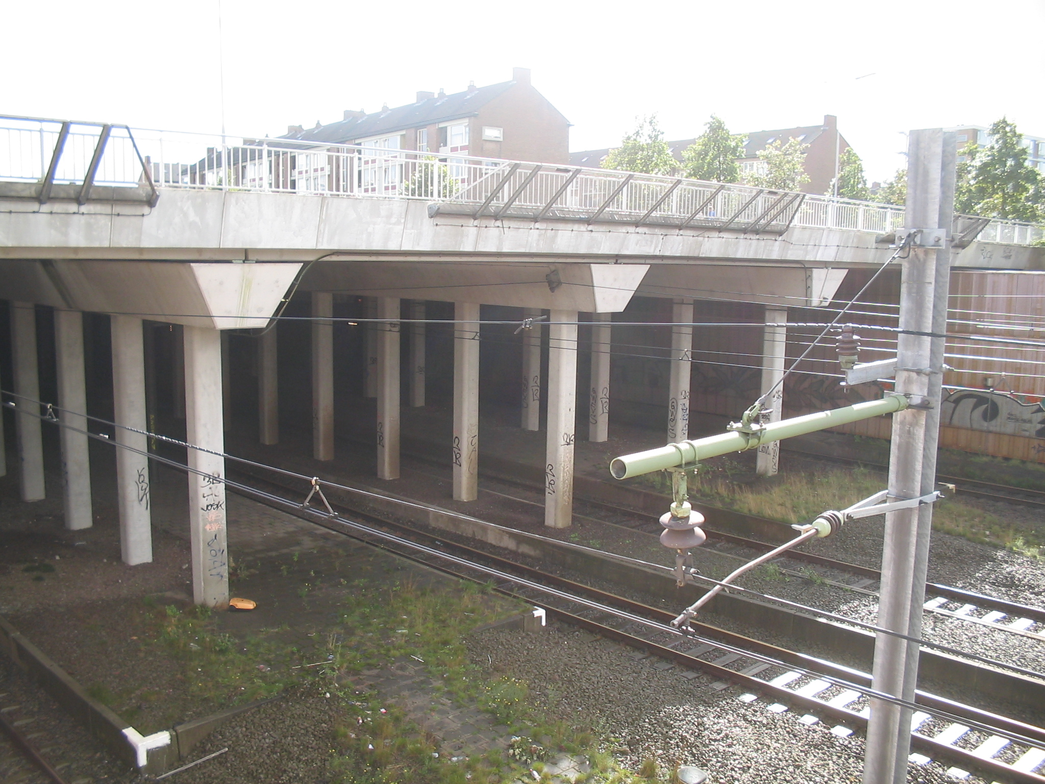 Railway tunnel, Rijswijk, 2 oktober 2005